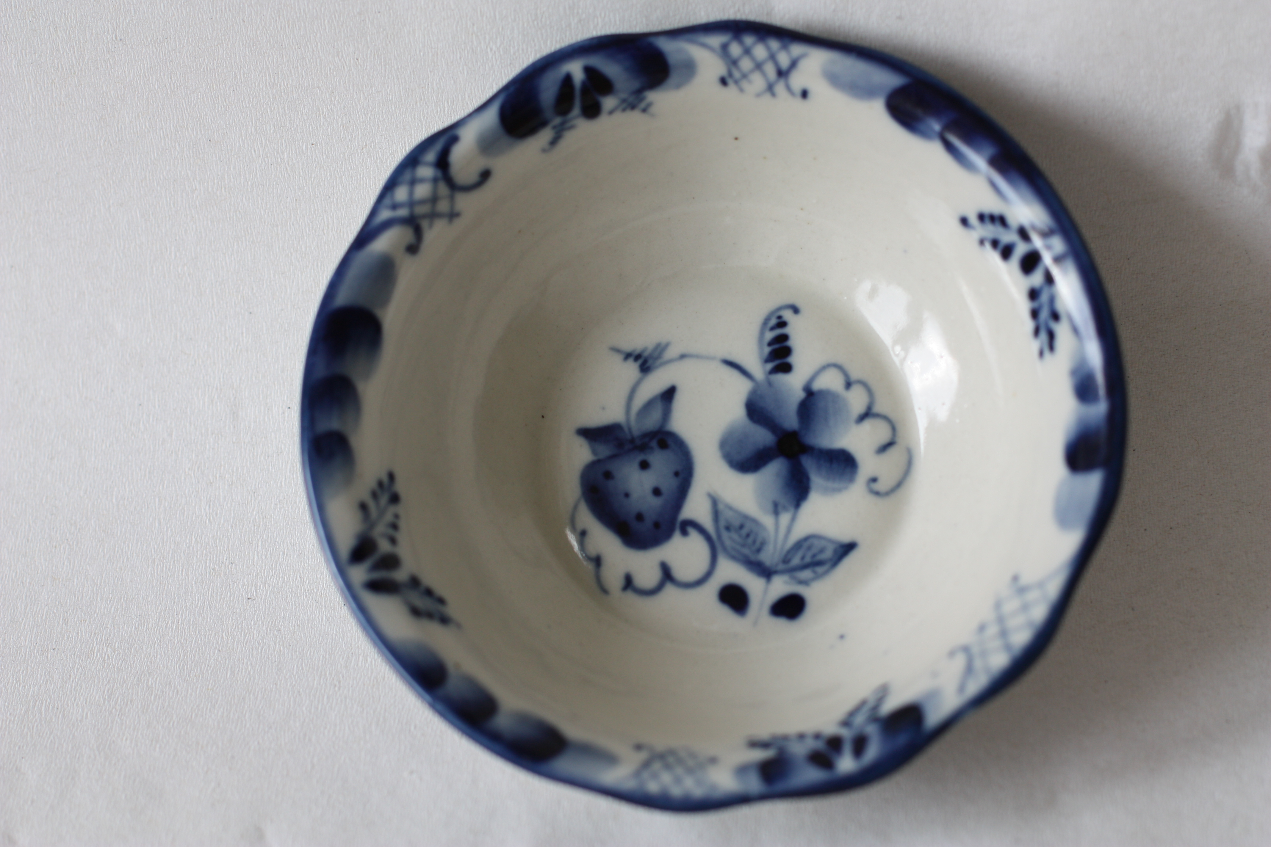 Gschel, Keramik, Russland